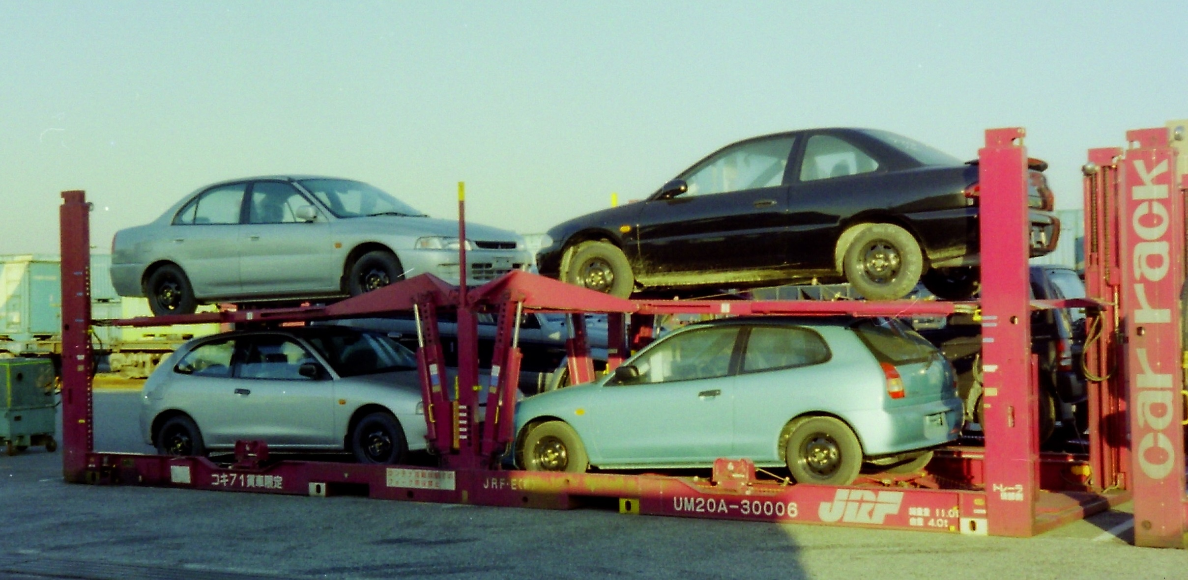 JR貨物より日本国内での鉄道輸送用に承認登録されて、民間企業が所有及び使用している 「 鉄道私有コンテナ 」 。 撮影地＝【愛知／名古屋(タ)】